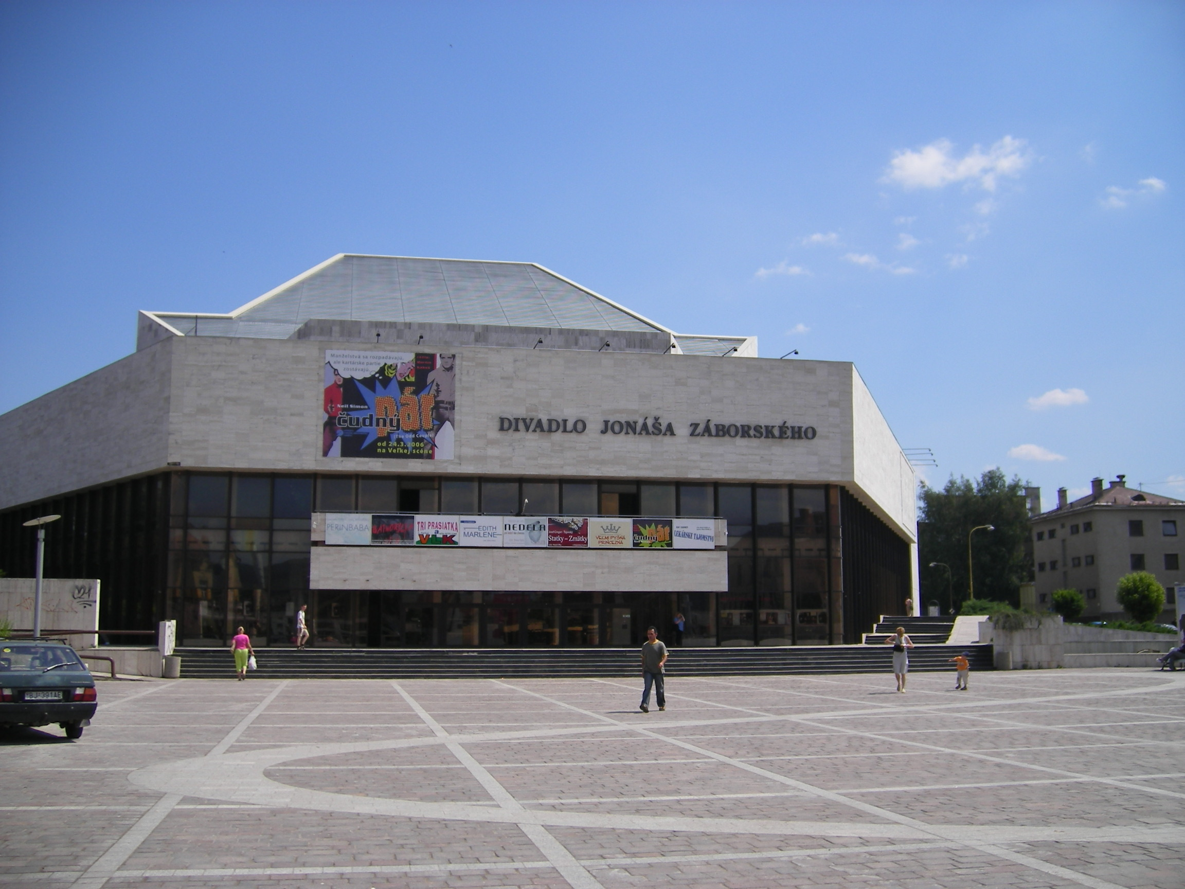 Prešov, Jonáš Záborský theatre